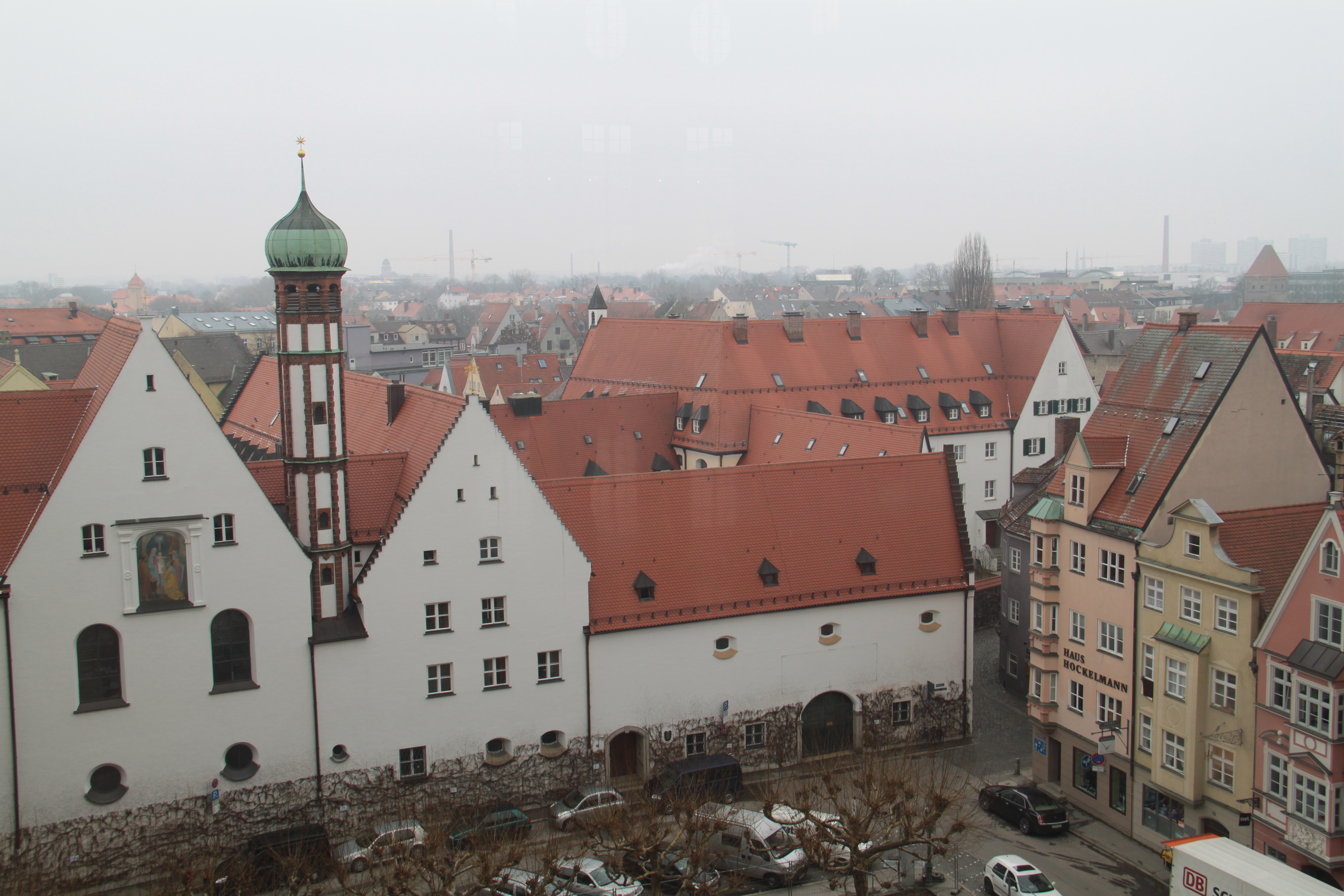 Impressionen Augsburg